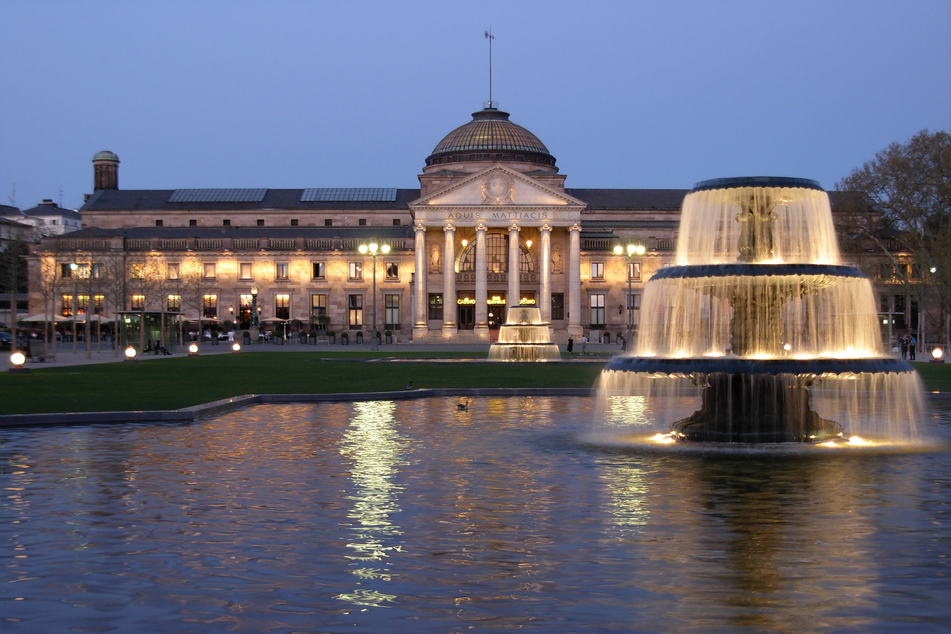 Wiesbaden Kurhaus mit den beiden Kaskadenbrunnen auf dem Bowling Green